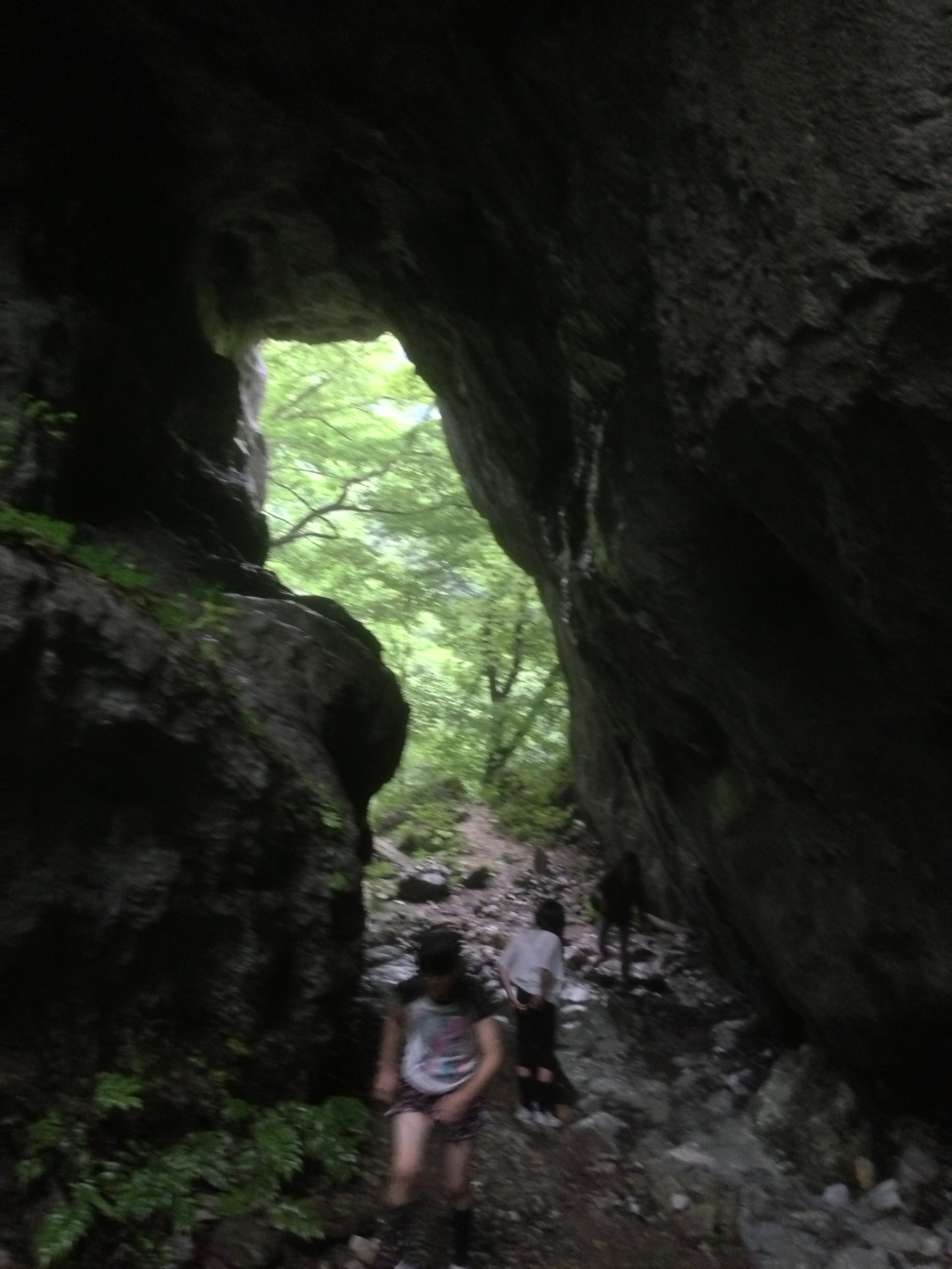 鬼の唐門。雨天の後は、洞窟跡を小川が流れる。広島県の帝釈峡にある天然橋